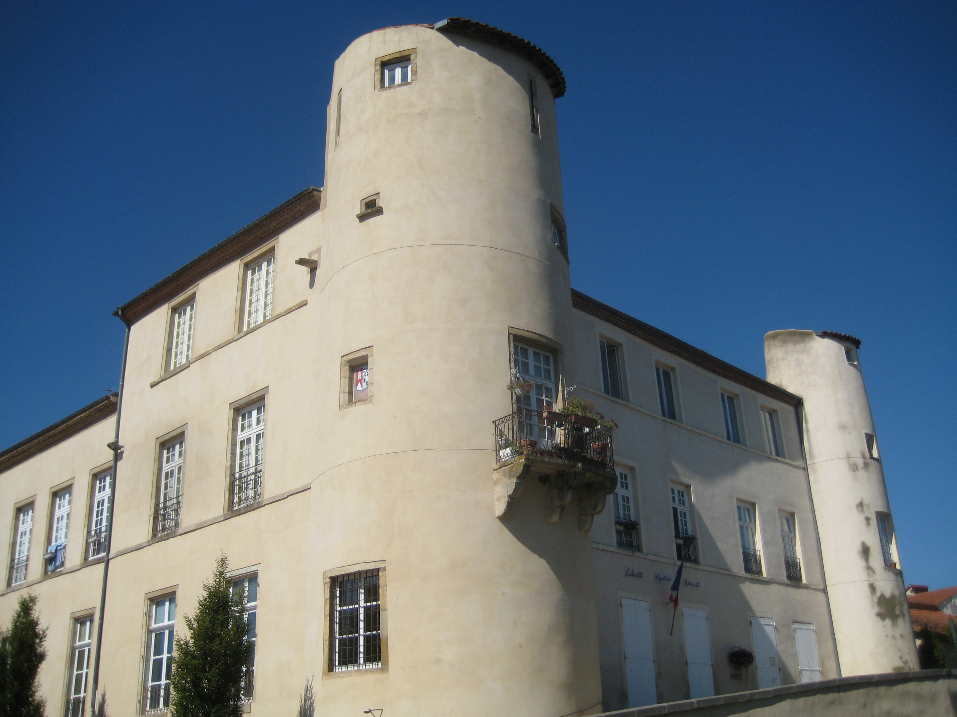 le Château de Plauzat, qui est également la mairie